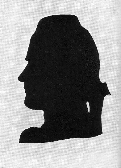 Heinrich Leopold Wagner (1747–1779), zeitgenössischer Scherenschnitt, einiziges Portrait Wagners (laut dieser Quelle). 1932 im Besitz des Frankfurters Goethemuseums